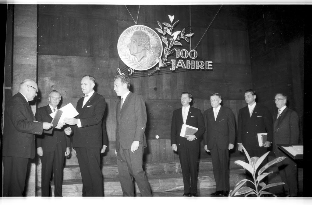 Festakt in der Pädagogischen Hochschule. Staatssekretär Franz Kock (1.v.l.) aus dem Landeskultsministerium überreicht die Auszeichnung zum 100jährigen Bestehen an Vertreter vom Männergesangverein Germania Kiel von 1864 e.V., vom Jugendblasorchester Concordia e.V., vom Männergesangverein Leck von 1864 e.V. und vom Gesangverein Germania Schleswig von 1864 e.V.